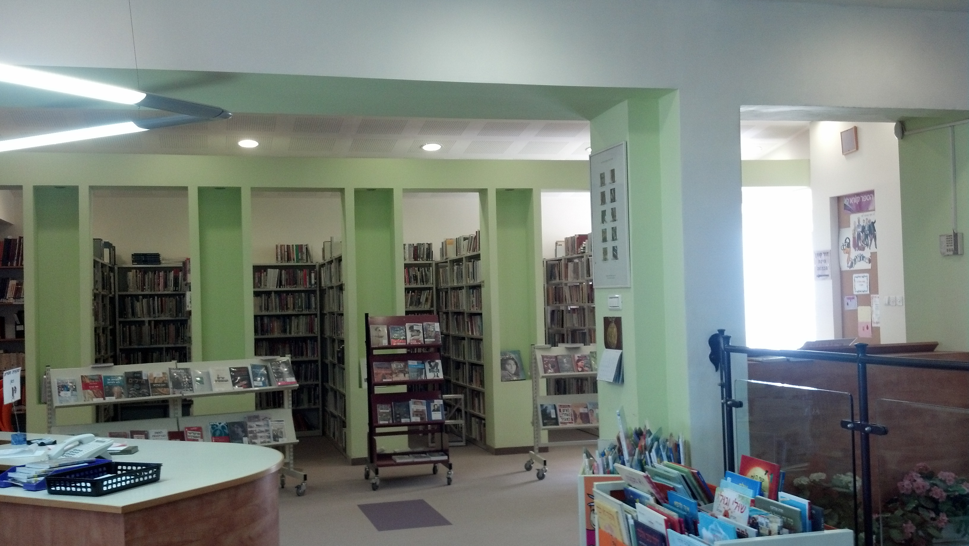 שתי ספריות תחת קורת גג אחת: ספריית בית ספר סולם צור והספרייה האזורית מטה אשר